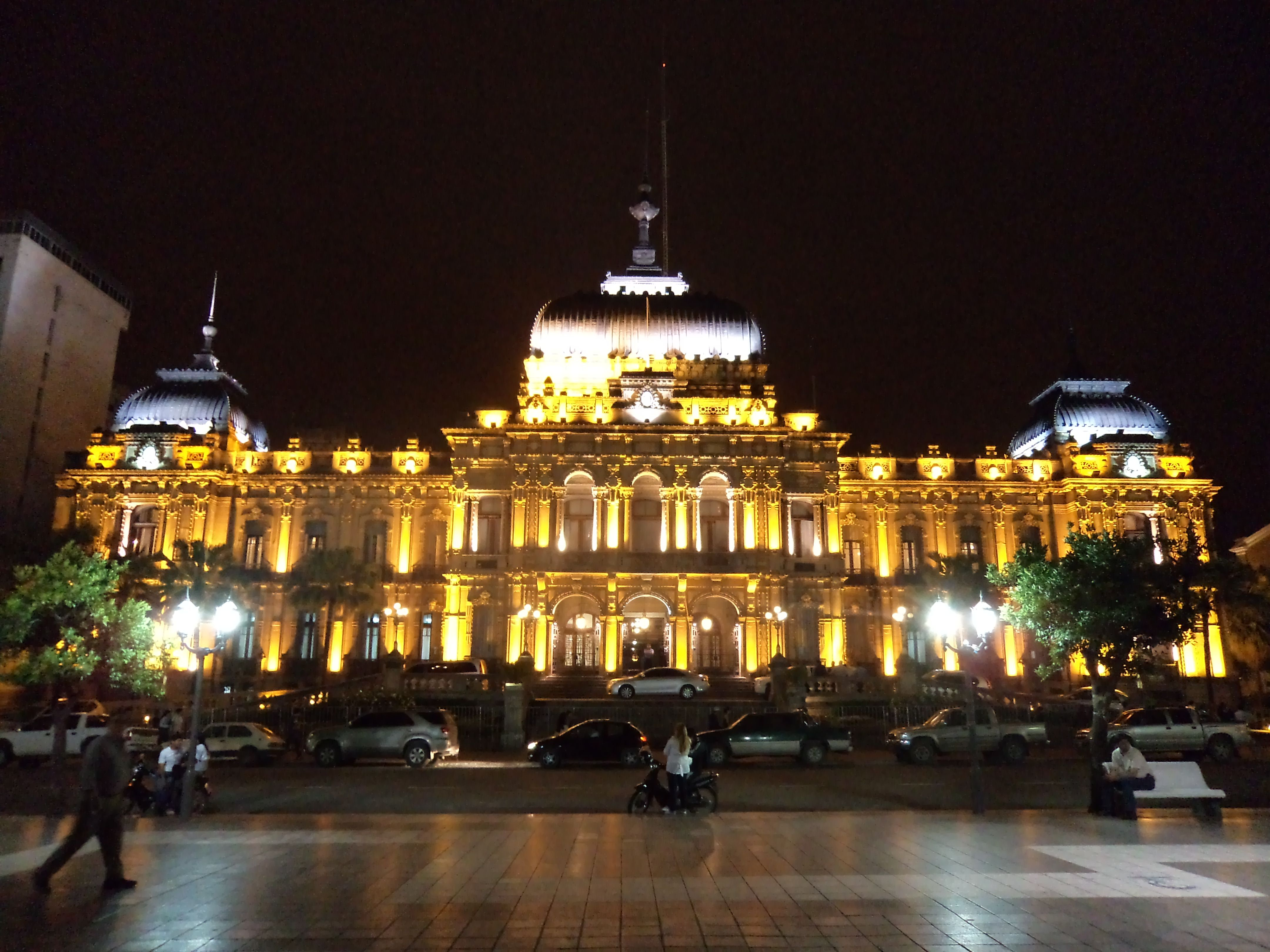 Casa de Gobierno de Tucumán Visto de noche y de frente